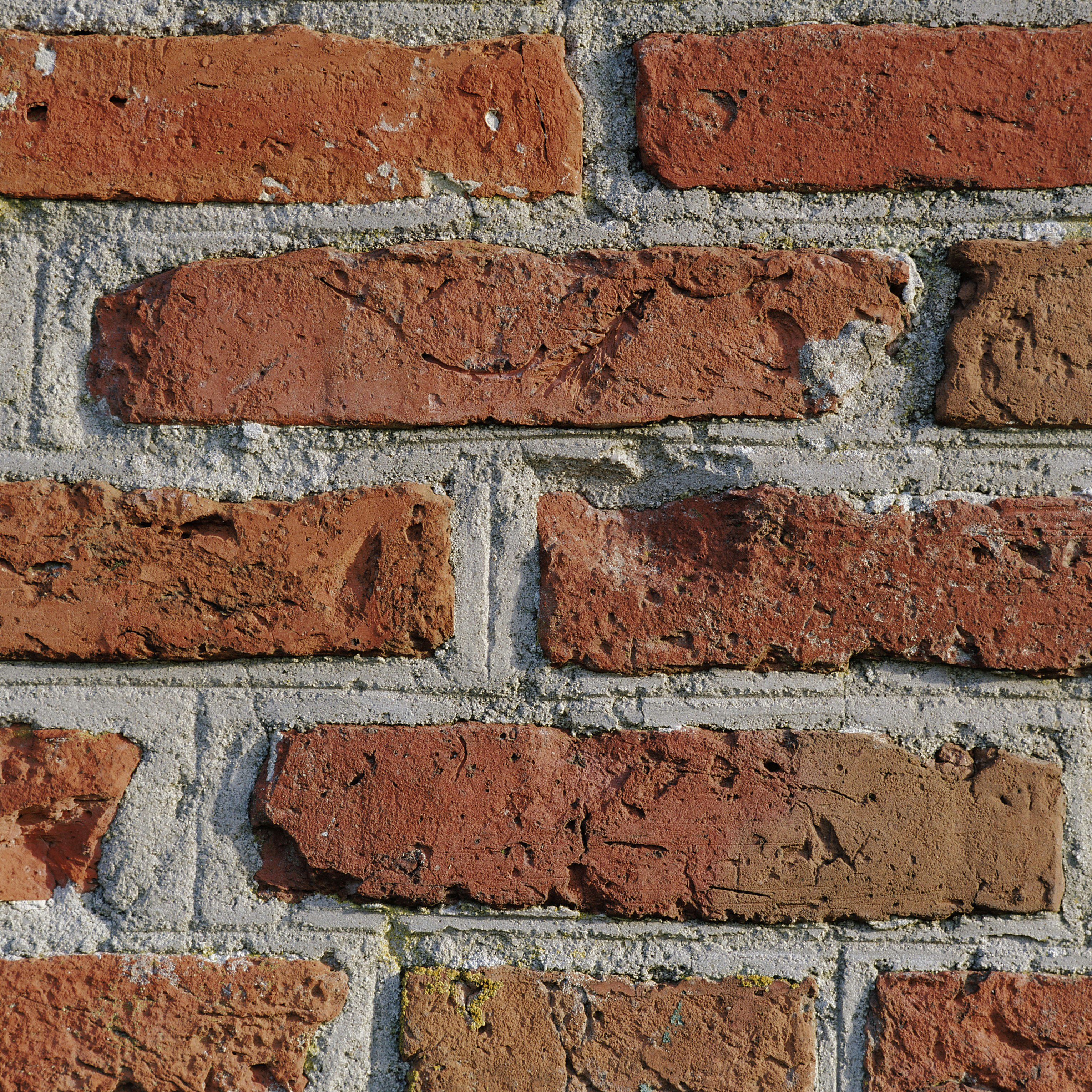 Woonhuis/ Metselwerk: Detail metselwerk, met dagstreep